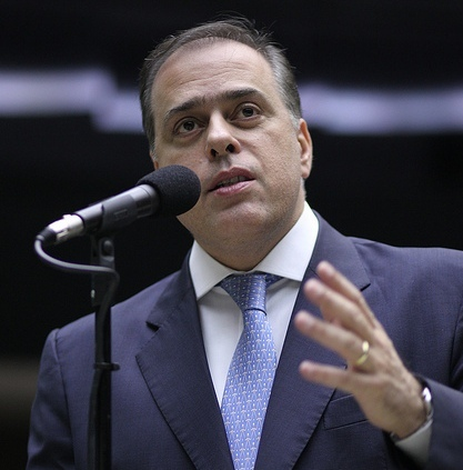 Paulo Abi-Ackel no microfone